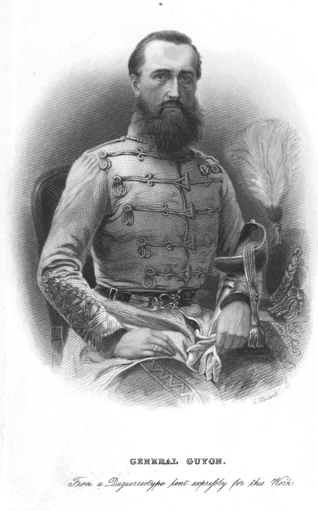 Guyon Richárd honvéd vezérőrnagy (litográfia)